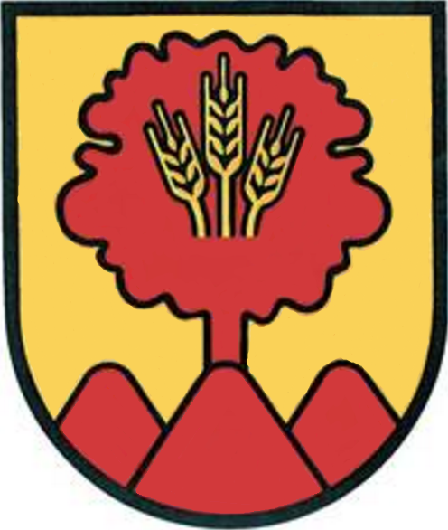 Die Symbolik des neuen Gemeindewappens deutet auf Geschichte und wirtschaftliche Situation des aufstrebenden Ortes: Der Dreiberg, Symbol für eine große Anzahl von Hallstattgrabhügeln erinnert daran, dass die Gegend um Schandorf einen der am frühesten besiedelten Plätze des südlichen Burgenlandes darstellt; der Lebensbaum ist Zeichen für das sich immer wieder erneuernde Leben in der Gemeinde. Die drei goldenen Ähren verweisen auf die Schandorfer Landwirtschaft, verheißen aber auch das lebensnotwendige Brot über Zeiten hinweg und zeugen vom Fleiß der GemeindebürgerInnen; die Farben Rot-Gold wurden zum Zeichen der Verbundenheit mit dem Land Burgenland gewählt.